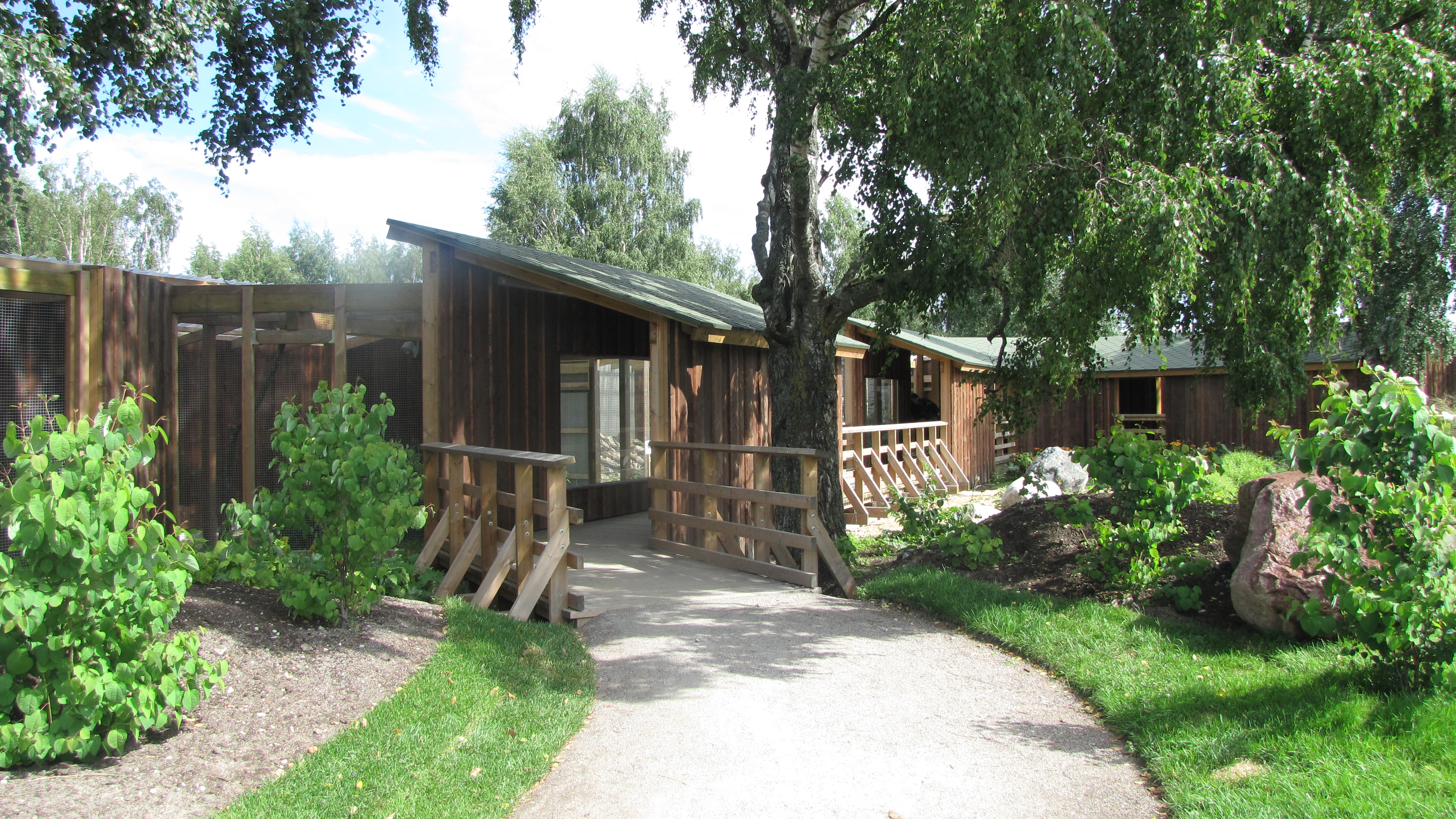 Väikekaslaste ekspositsioon Tallinna loomaaias